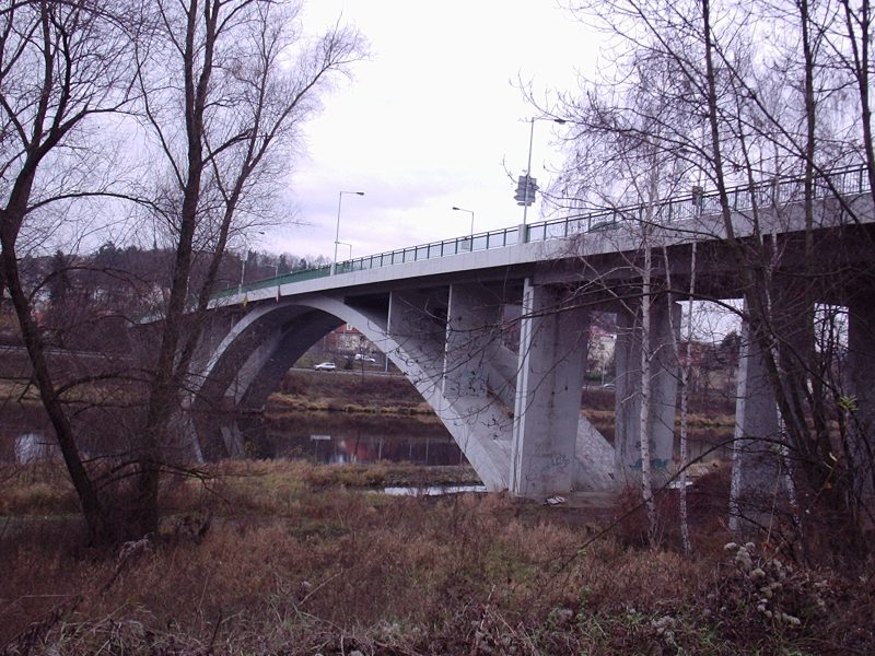 pohled na most ze strany od vlakového nádraží Praha-Zbraslav